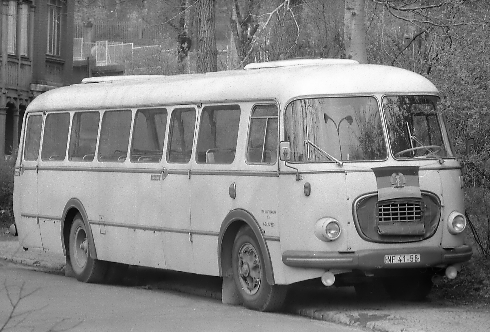 Omnibus Jelcz 043, EDV-Nummer 4-7424/390, Baujahr ca. 1970, des VEB Kraftverkehr Jena am 1. Mai 1981 in der Felsenkellerstraße Jena